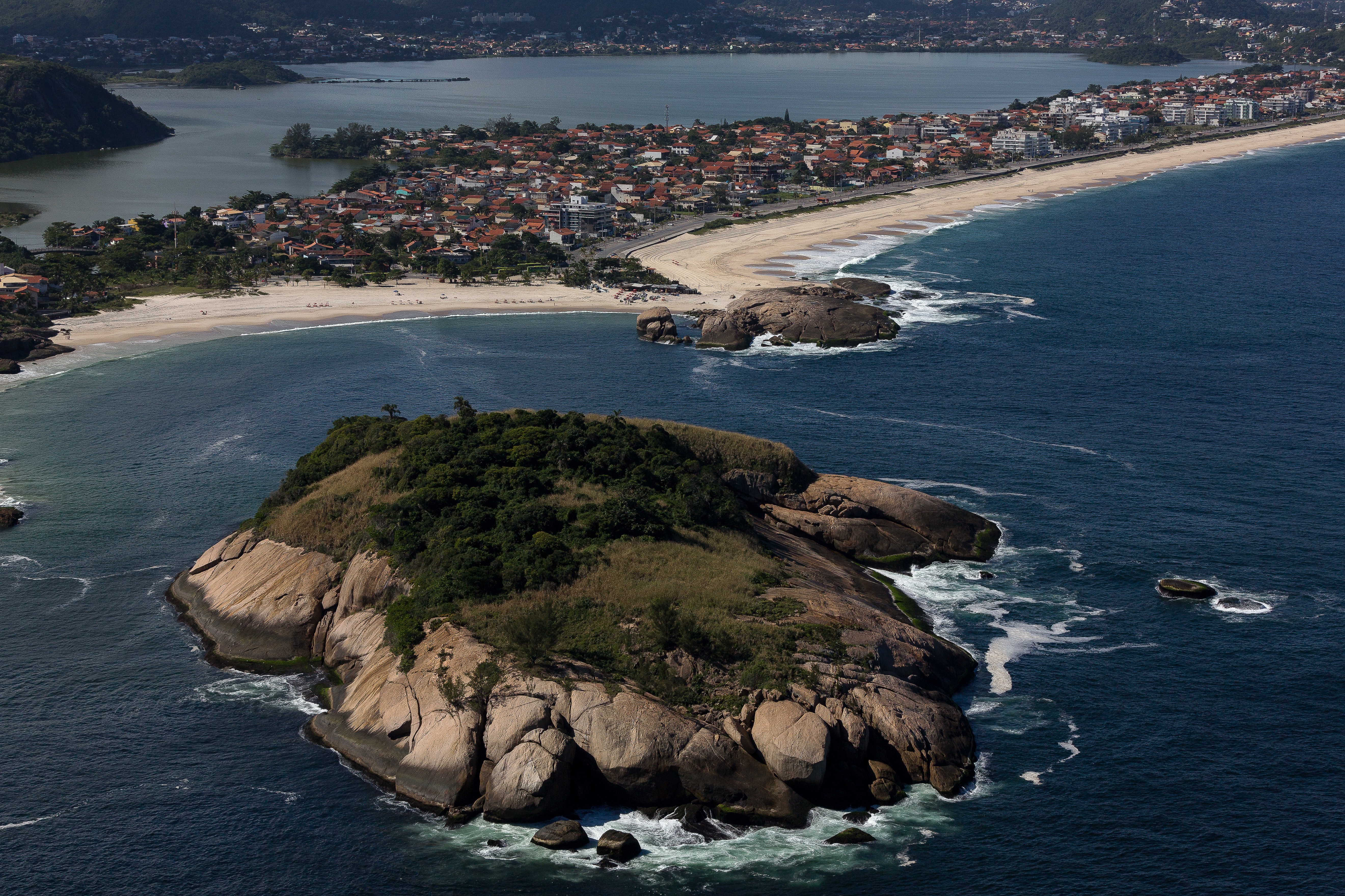 Vista aérea da Ilha do Veado, Piratinga, Niterói - RJ - Brasil.